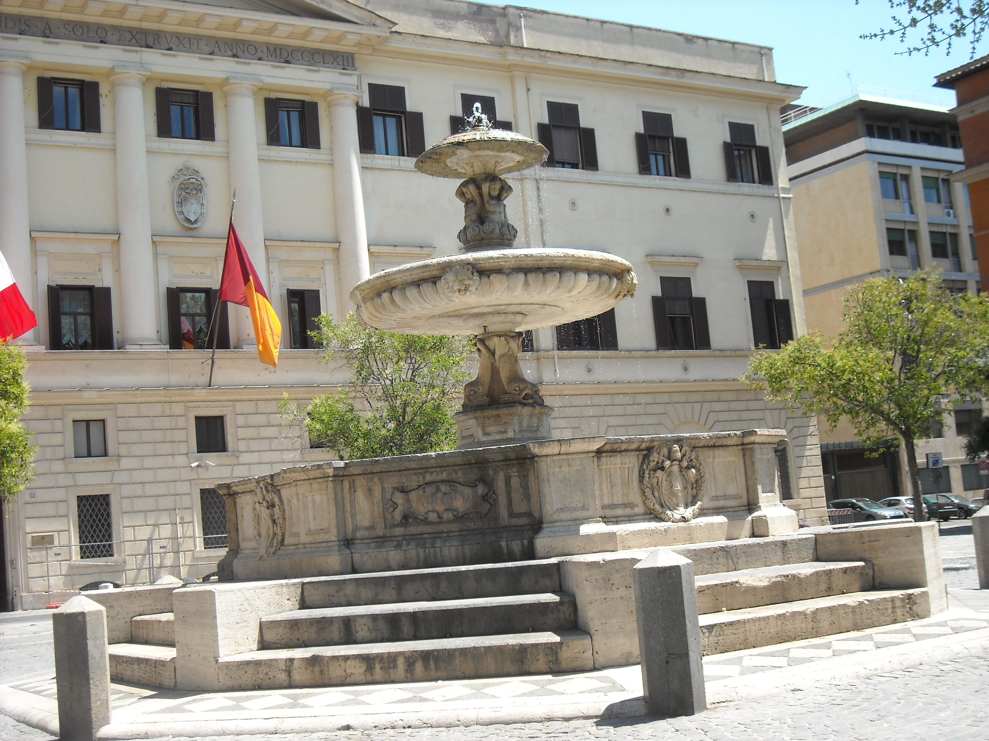 La fontana al centro di piazza Mastai, a Roma